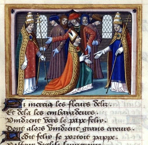 Félix V faisant allégeance à Nicolas V, par Martial d'Auvergne, enluminure issue de l'ouvrage Vigiles de Charles VII, Paris, France, XV°siècle.